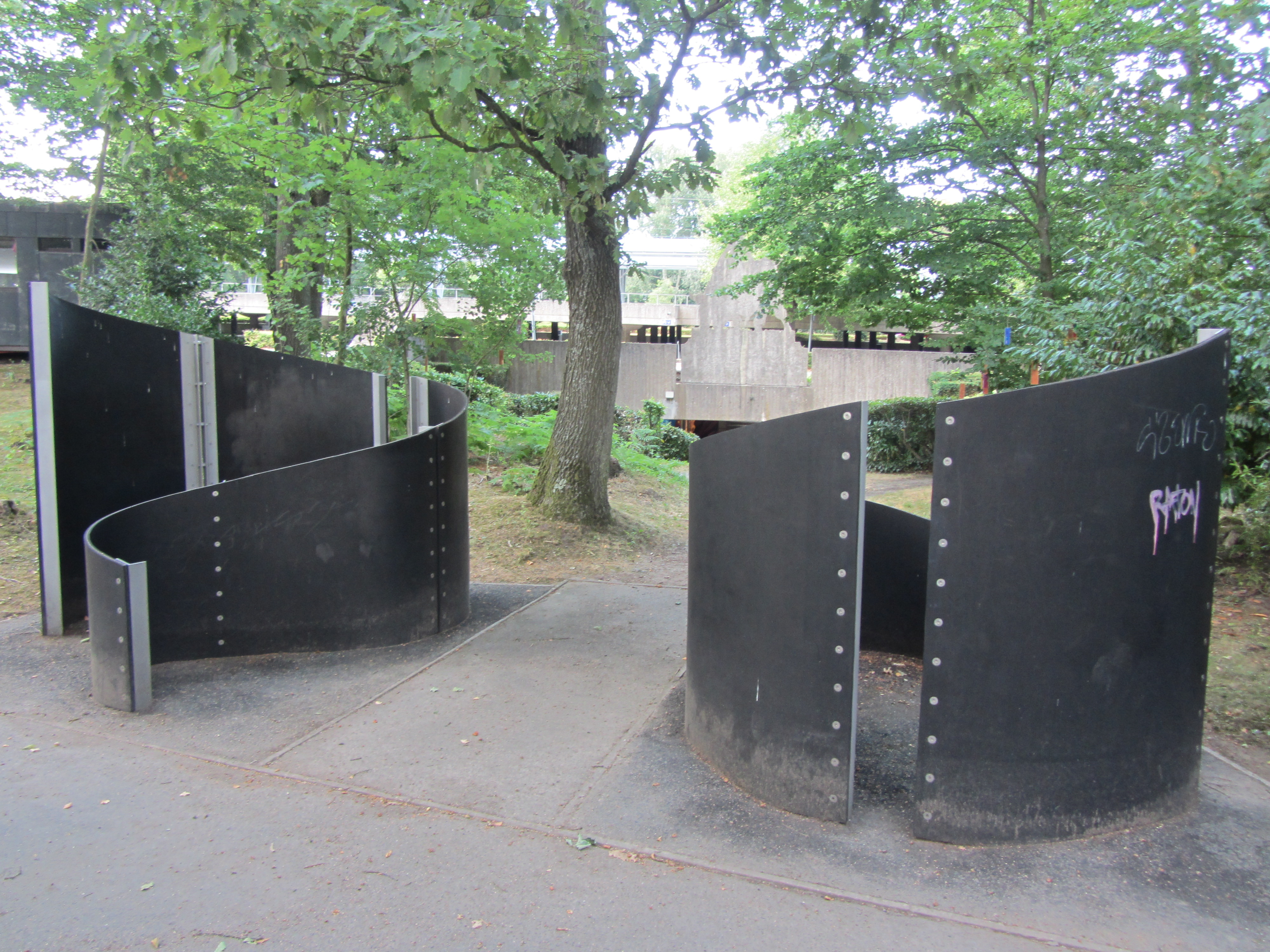 Transit, sculpture en acier et néoprène de Tapta, Musée en plein air du Sart Tilman en Belgique